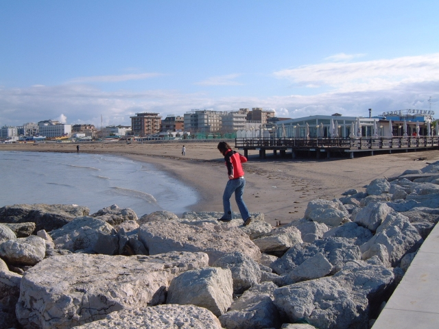 Cesenatico (Italie), la plage du "Levante", côté du gratte-ciel